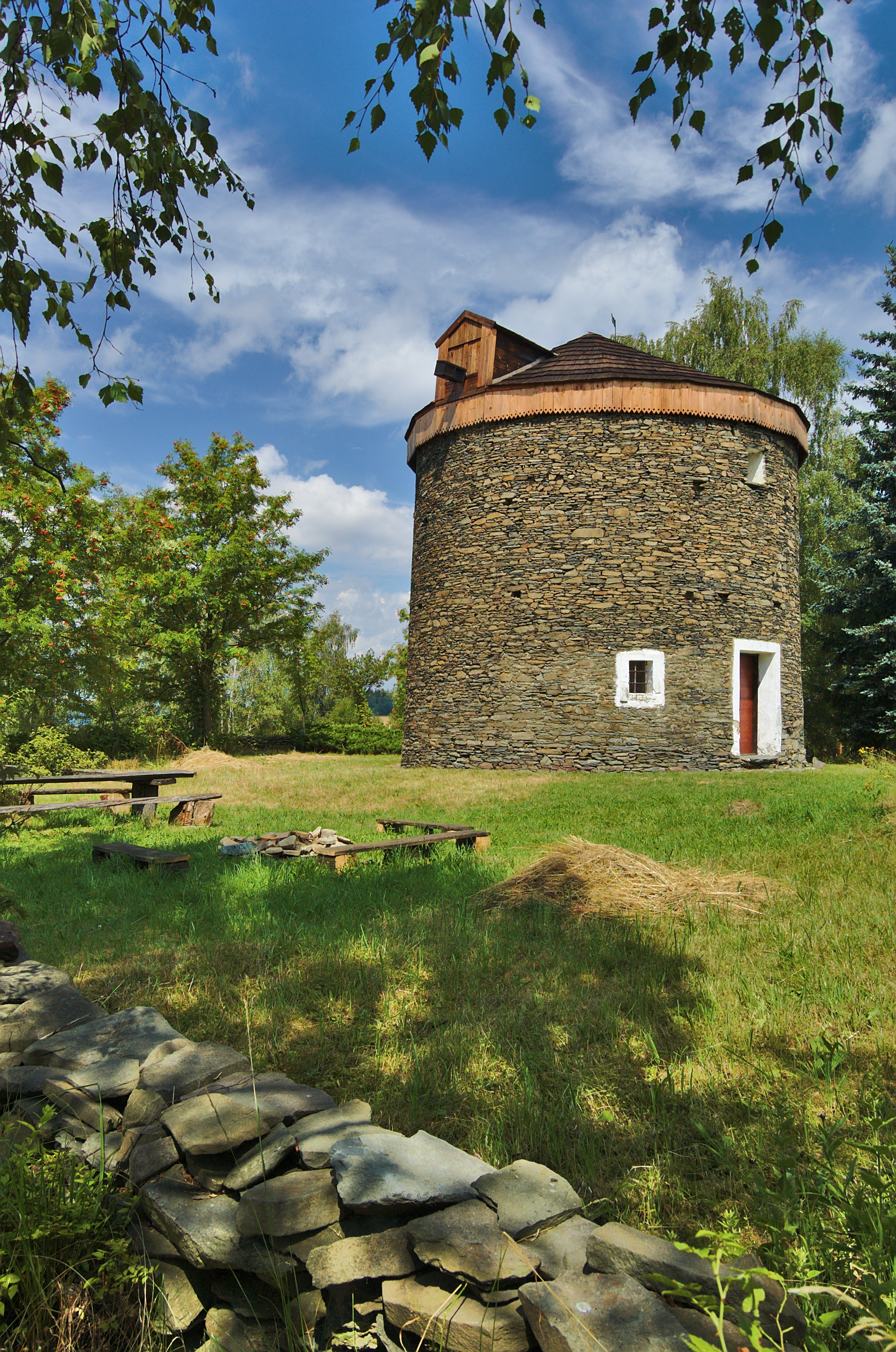 Větrný mlýn, Kořenec, okres Blansko